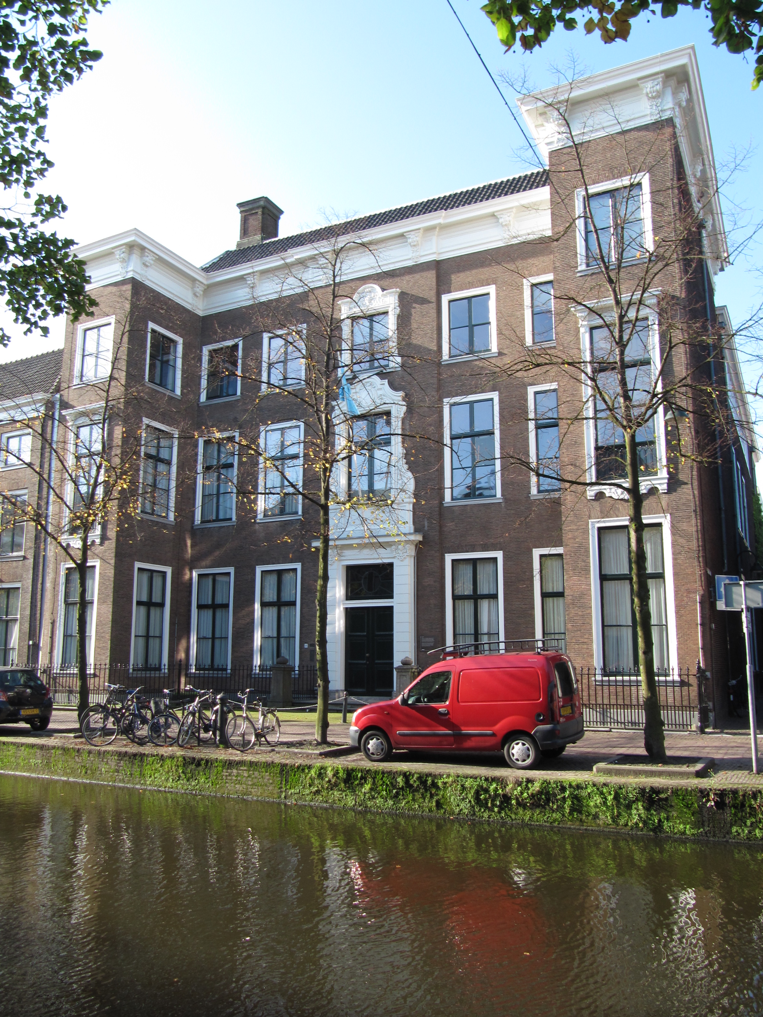 RM11999 Delft - Oude Delft 95.jpg